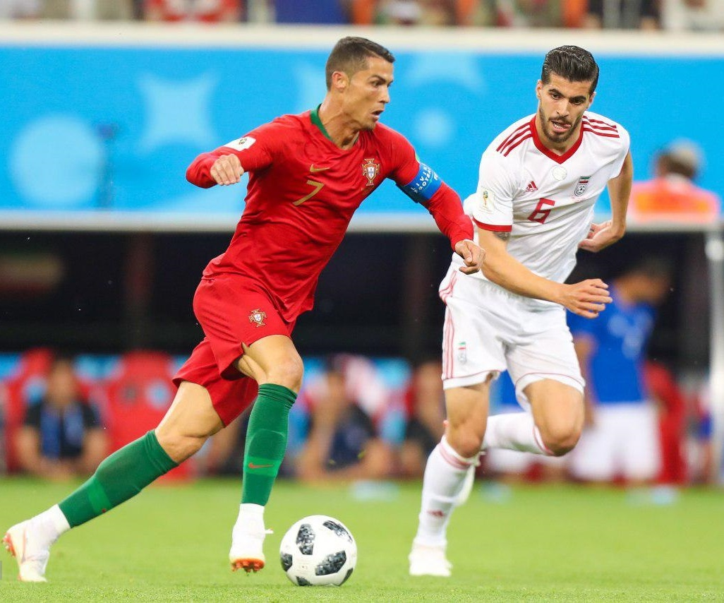 نیمه نخست بازی تیم‌های فوتبال ایران و پرتغال در جام جهانی ۲۰۱۸